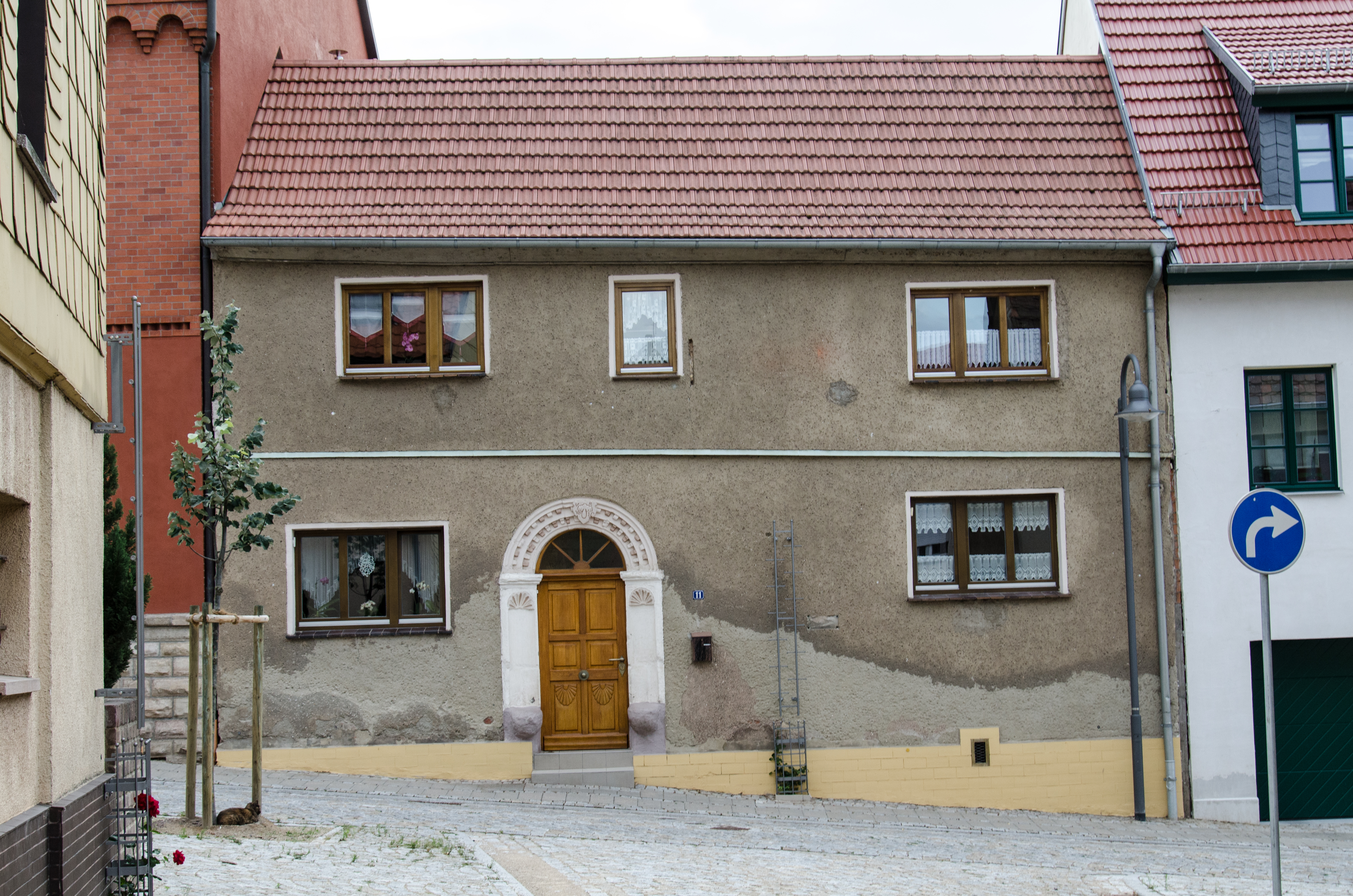 Sangerhausen, Kirchberg 11